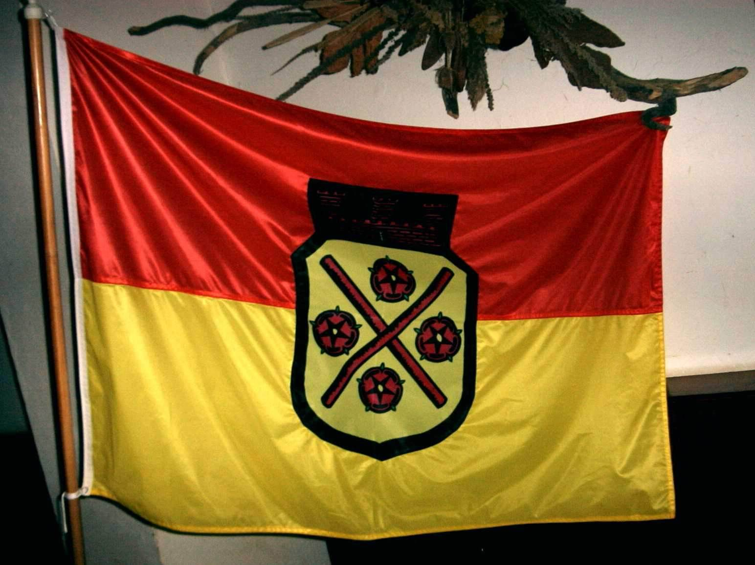 inoffizielle Flagge der Stadt Gützkow